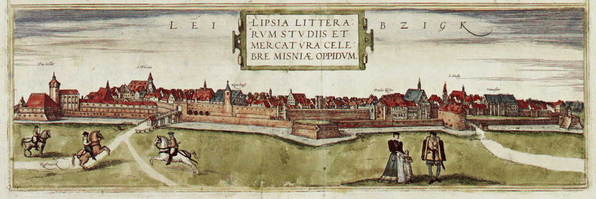 Leipzig